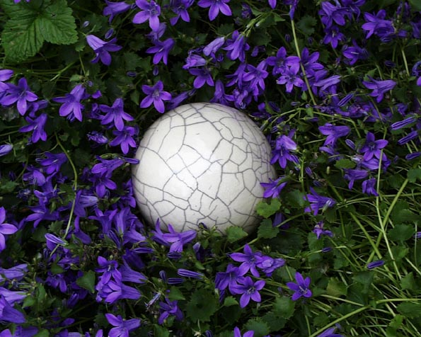 Raku gestookte bal